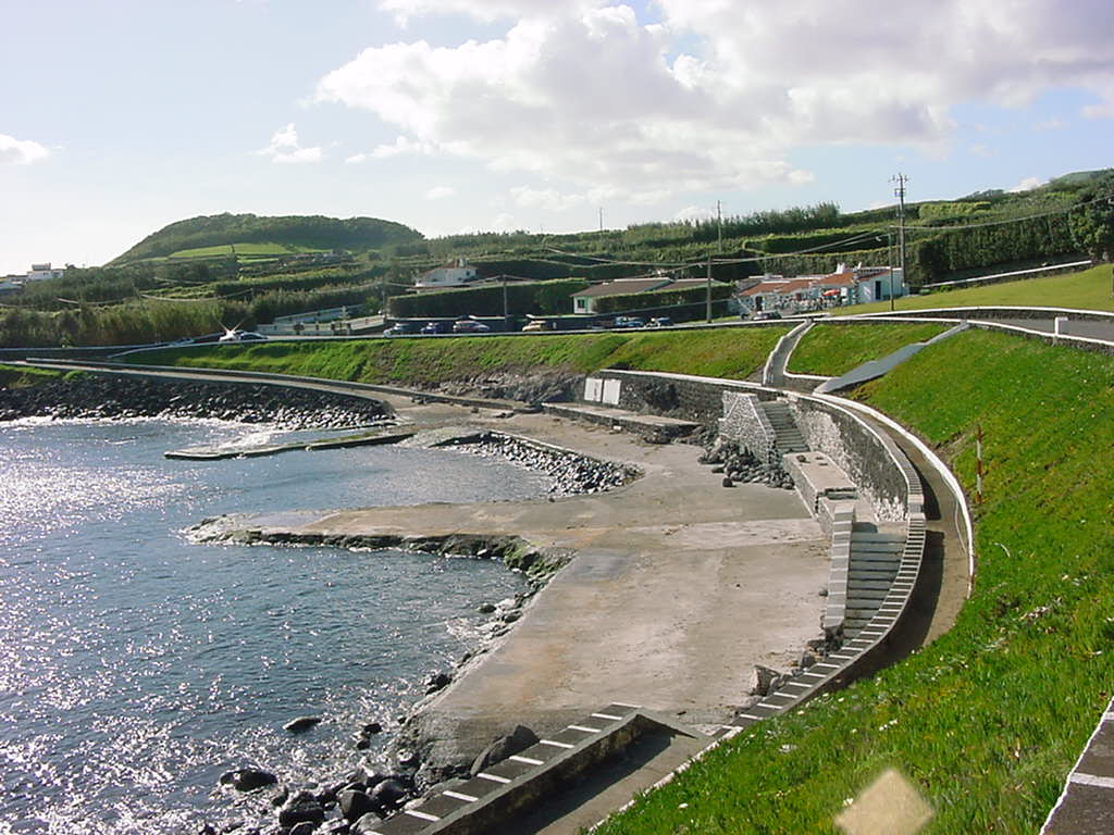 Baía da Salga, Vila de São Sebastião, ilha Terceira, Açores, Portugal.